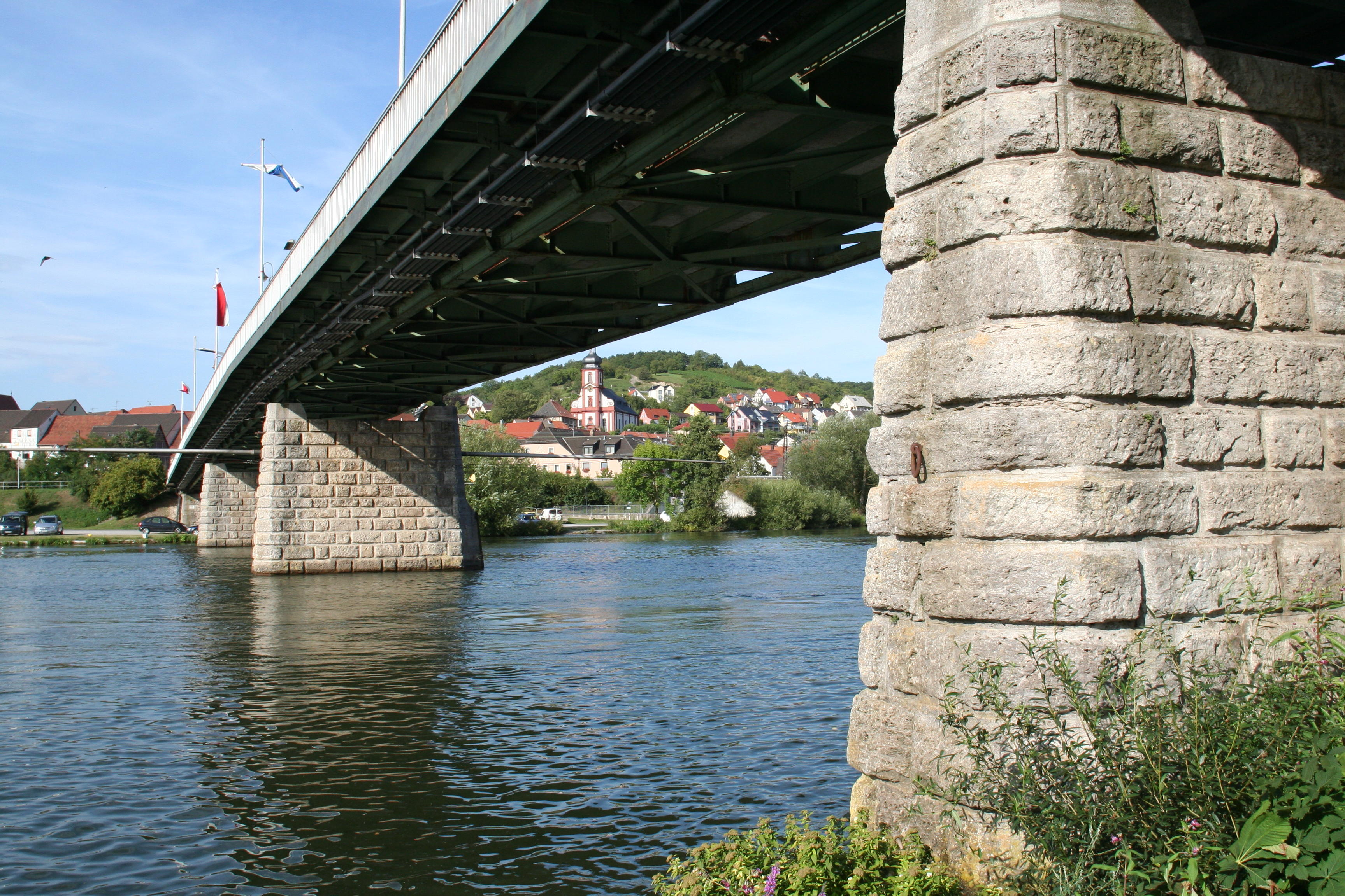 Alte Mainbrücke Zellingen, Landkreis Main-Spessart